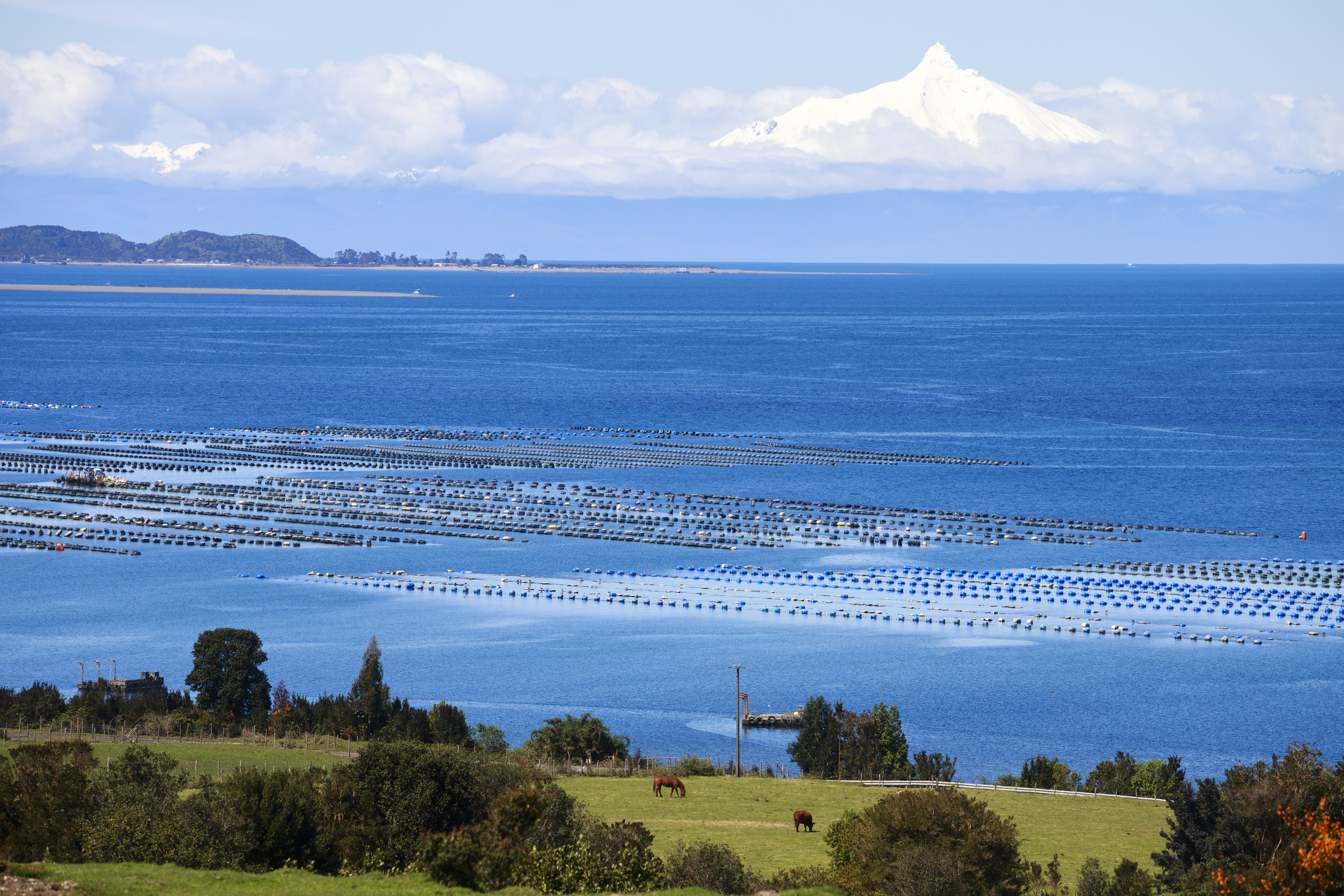 y cultivos de chorito desde queilen Volcán Corcovado y cultivos de chorito desde Queilen